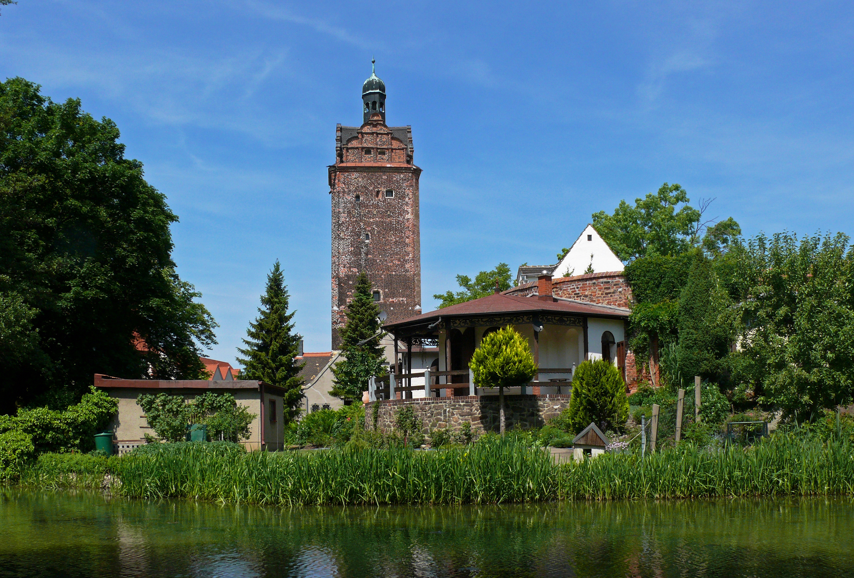 Hallescher Turm - Blick von der Wallgrabenpromenade